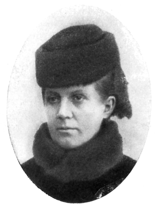 Anna Dostoyevskaya.